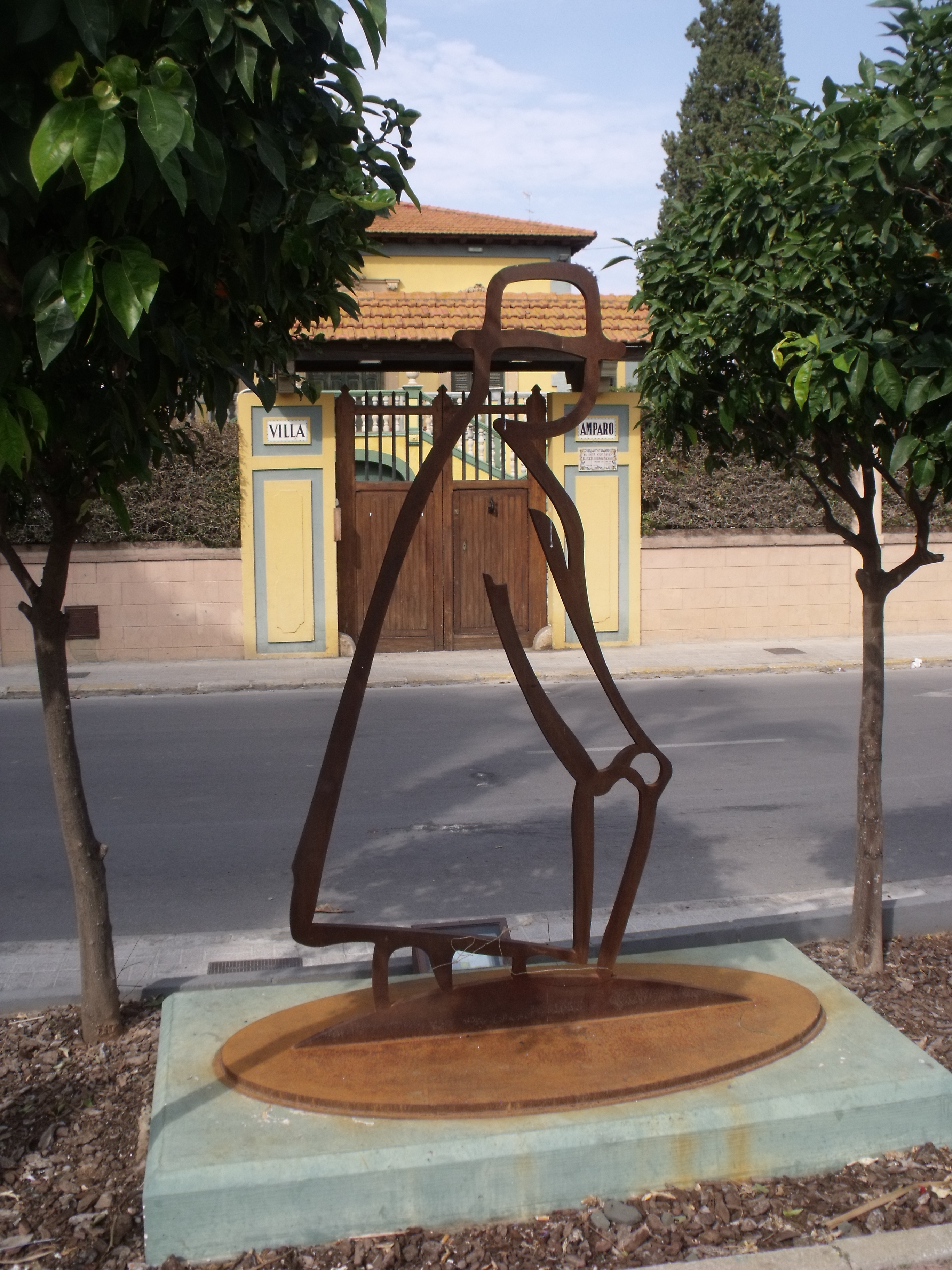 Residencia de Antonio Machado. Escultura conmemorativa sita enfrente de la Villa Amparo.